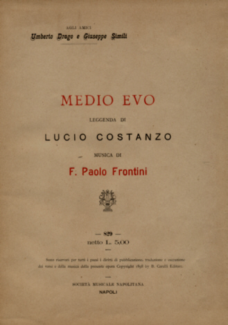 Medio Evo,1898